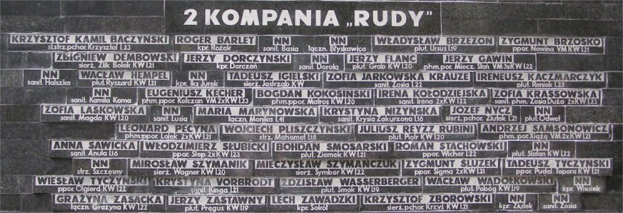 ściana z nazwiskami poległych w powstaniu żołnierzy batalionu "Zośka", Powązki Wojskowe w Warszawie (fragment z nazwiskami powstańców z 2. kompanii "Rudy") (fot Zu)